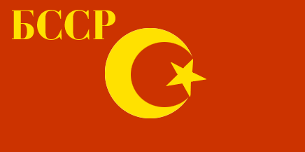 Флаг Бухары (с 18 сентября 1924 по 22 июля 1925 года)